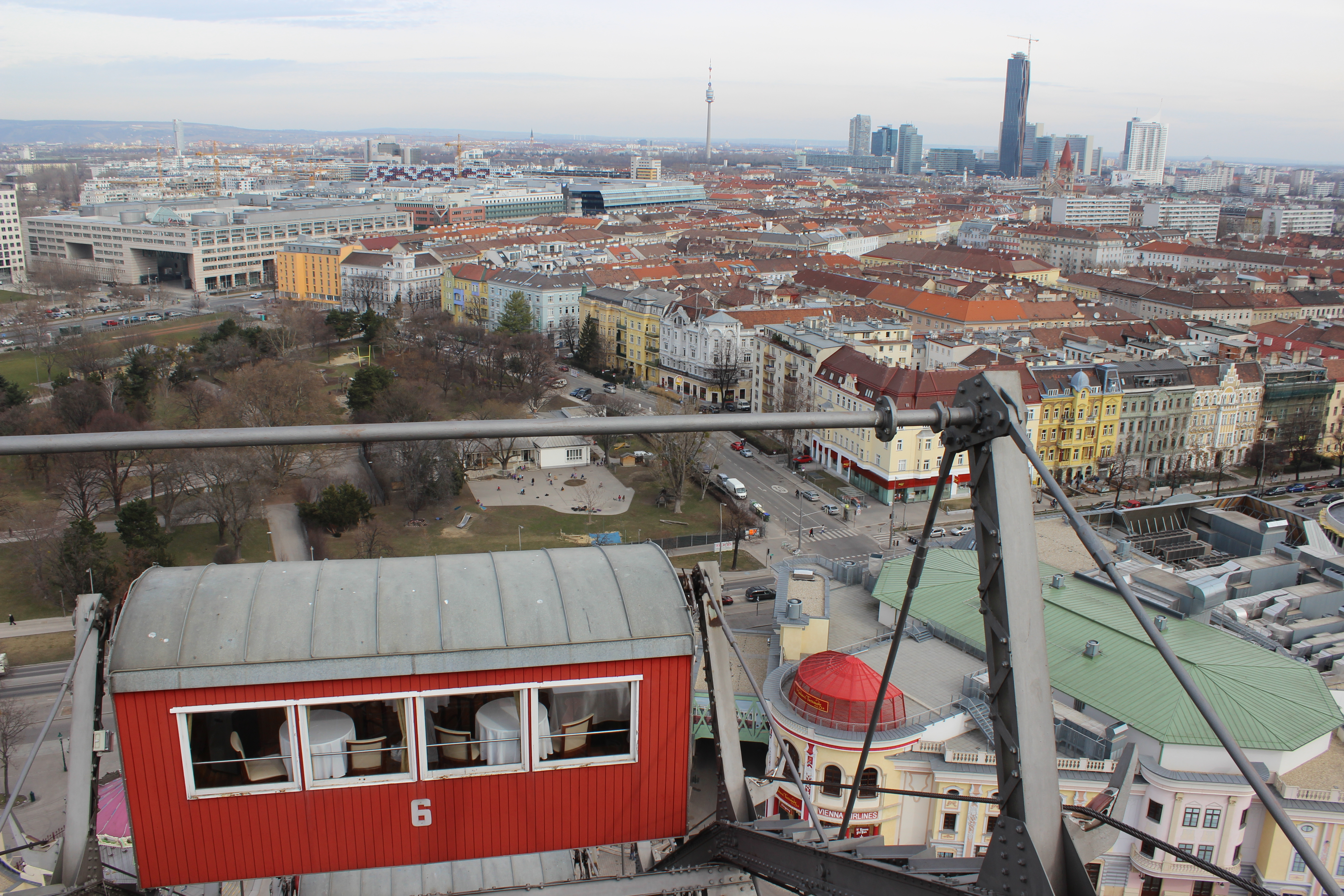 Riesenrad Vienna, Austria